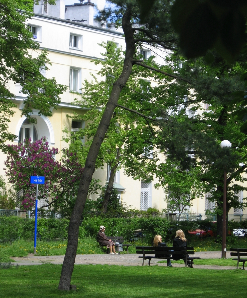 Skwer Sue Ryder na warszawskiej Ochocie, widok w stronę ul. Dantyszka: Sue Ryder square in Warsaw, Poland